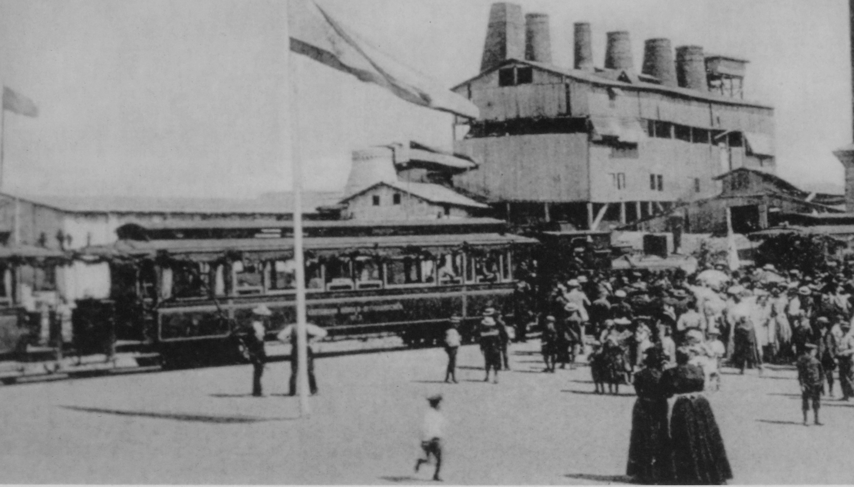 Kleinbahn Eröffnungszug 1906